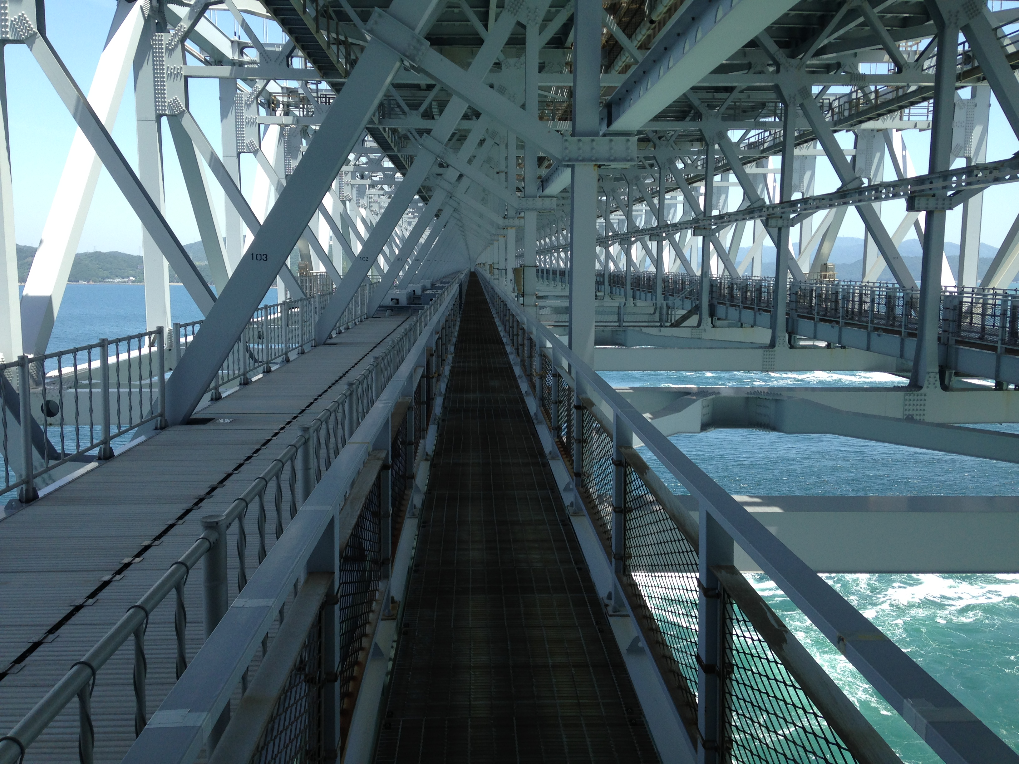 渦の道より望む桁内の点検用通路